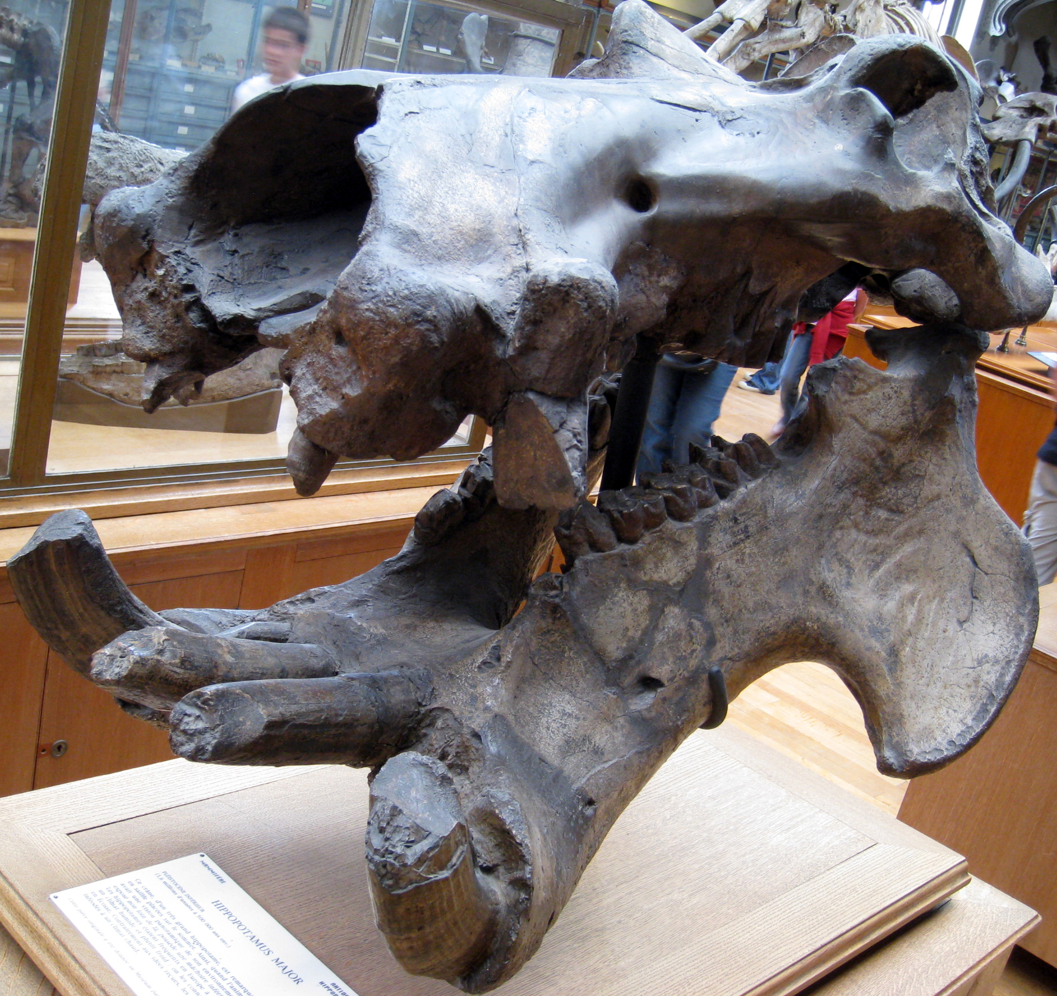 Hippopotamus major skull, Muséum national d'histoire naturelle, Paris.